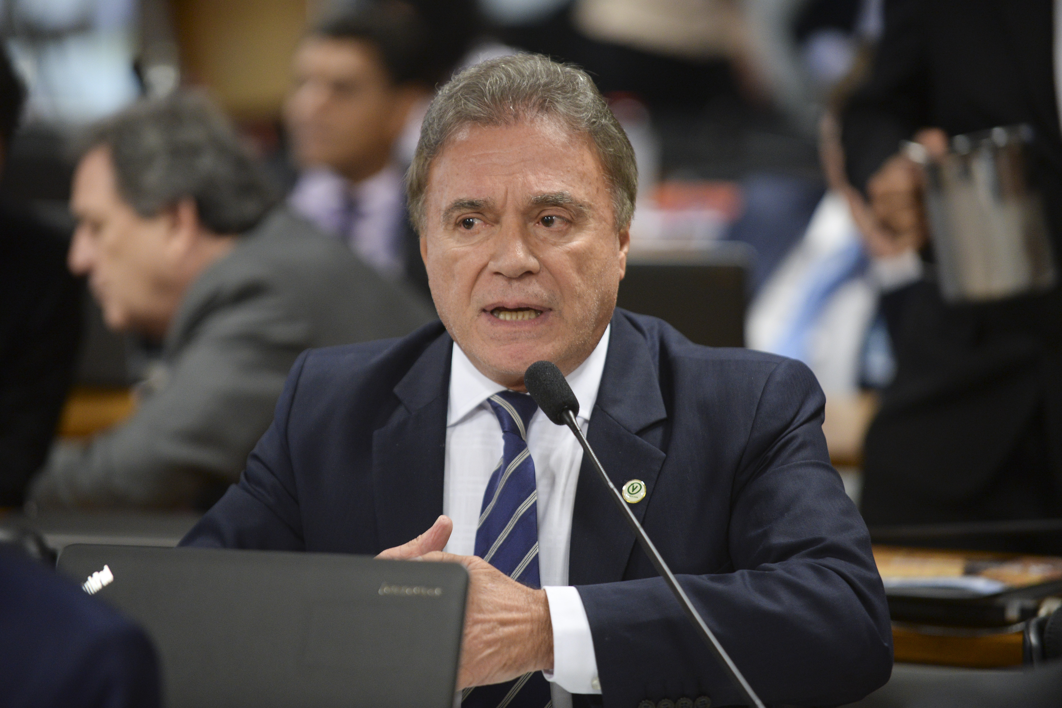 Comissão Especial do Impeachment 2016 (CEI2016) realiza reunião para manifestação da defesa da presidente Dilma Rousseff e discussão do relatório. Em pronunciamento, senador Alvaro Dias (PV-PR). Foto: Jefferson Rudy/Agência Senado